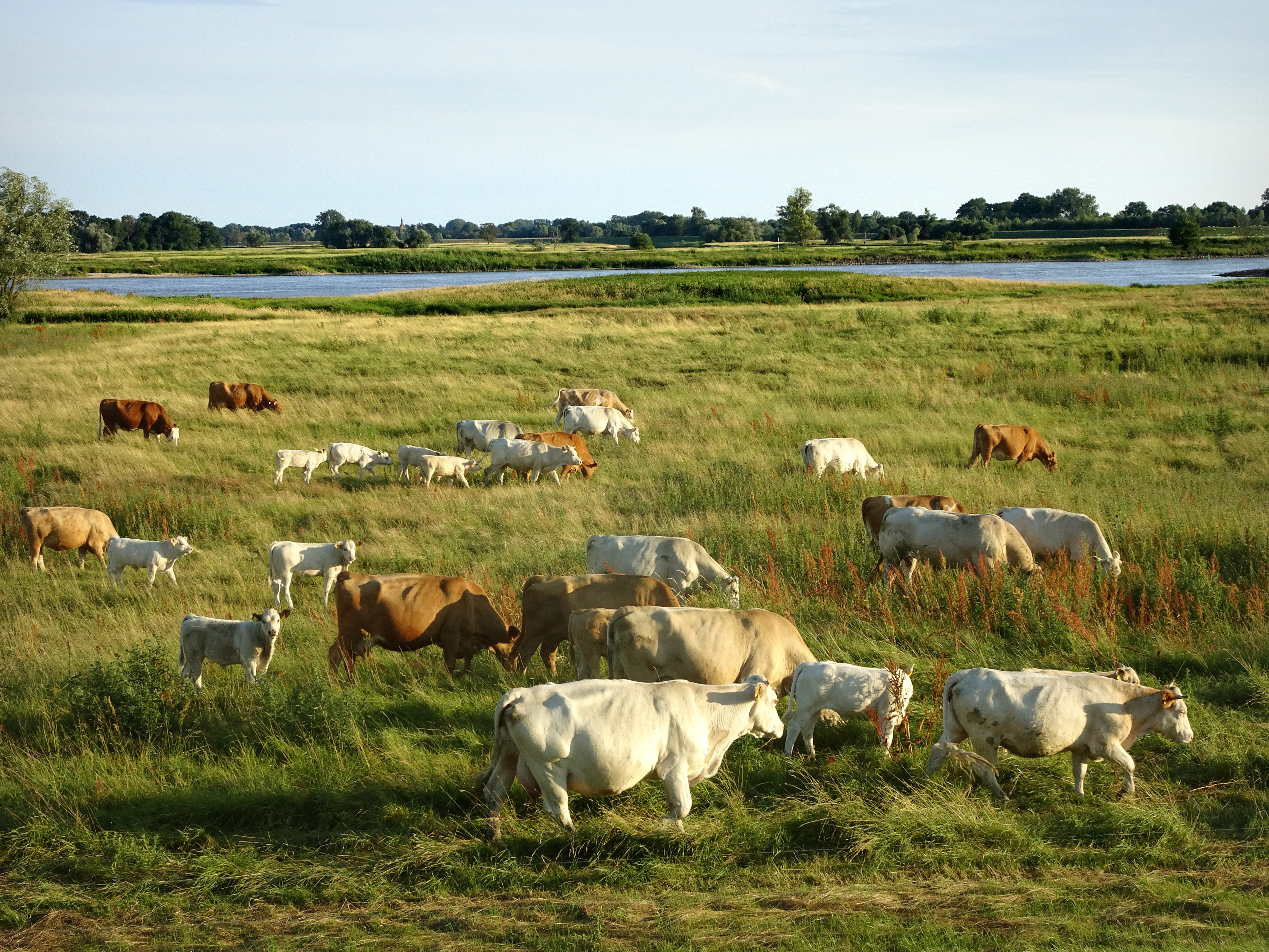 Mutterkuhherde in der Elbaue bei Hinzdorf (Stadt Wittenberge im Landkreis Prignitz in Brandenburg) – Der Bereich gehört zu mehreren Schutzgebieten: Biosphärenreservat "Flusslandschaft Elbe" FFH-Gebiet DE-3036-302 "Elbdeichhinterland" EU-Vogelschutzgebiet DE-3036-401 "Unteres Elbtal" Naturschutzgebiet "Wittenberge-Rühstädter Elbniederung" CDDA-Code 329727 Landschaftsschutzgebiet "Brandenburgische Elbtalaue" CDDA-Code 320055